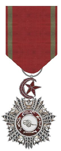 De Keizerlijke Orde van Mejidie of "Medjidjie", in het Turks "Nishan-i-Mejidie", "Nishan-i-Majidia" of "Mecidi Nishani"